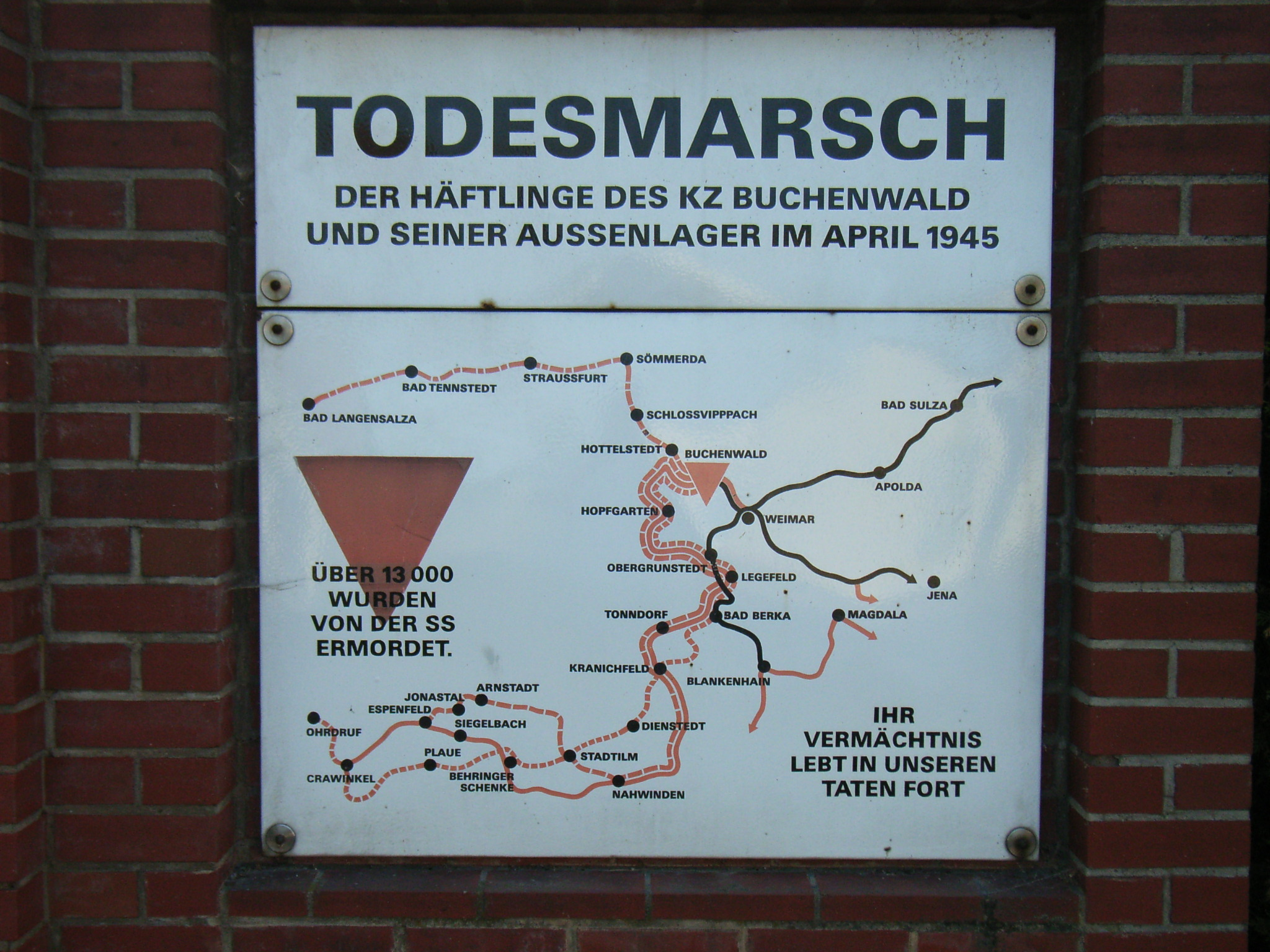 Crawinkel, Gedenktafel für den Buchenwald-Todesmarsch